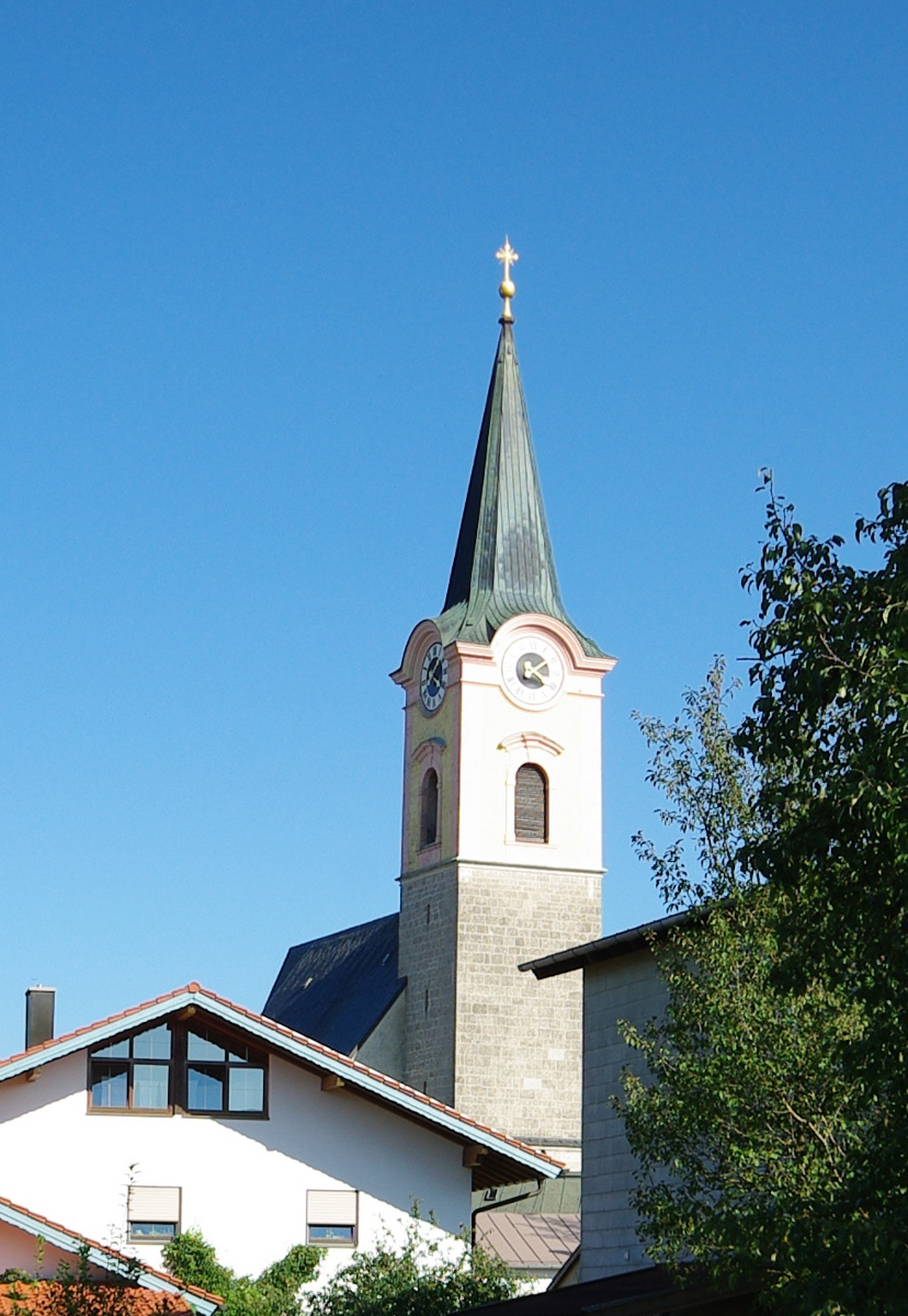 Klosterweg 5, 83317 Teisendorf Katholische Pfarrkirche St. AndreasThis is a photograph of an architectural monument.